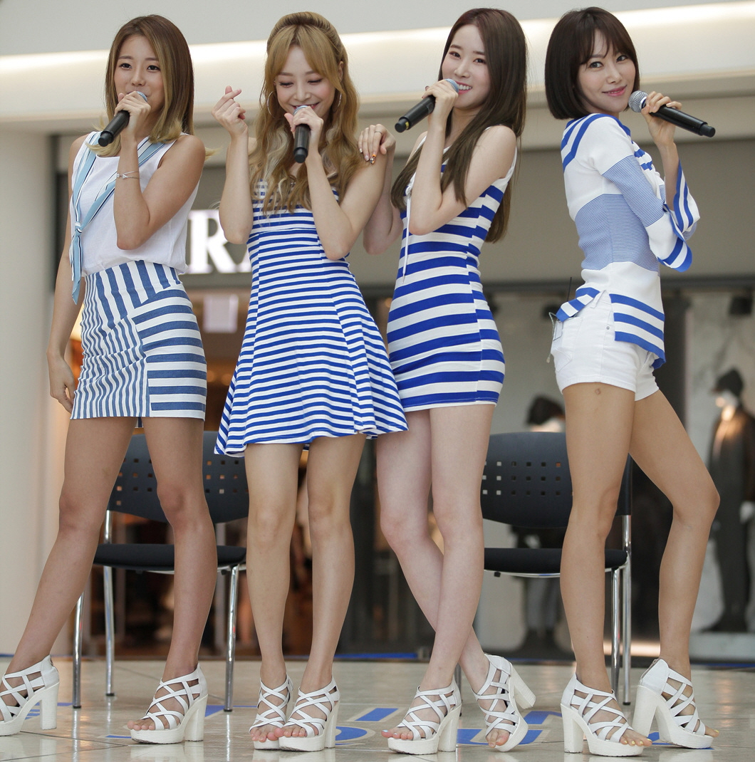 멜로디데이(MelodyDay) 영등포 타임스퀘어 문화공연